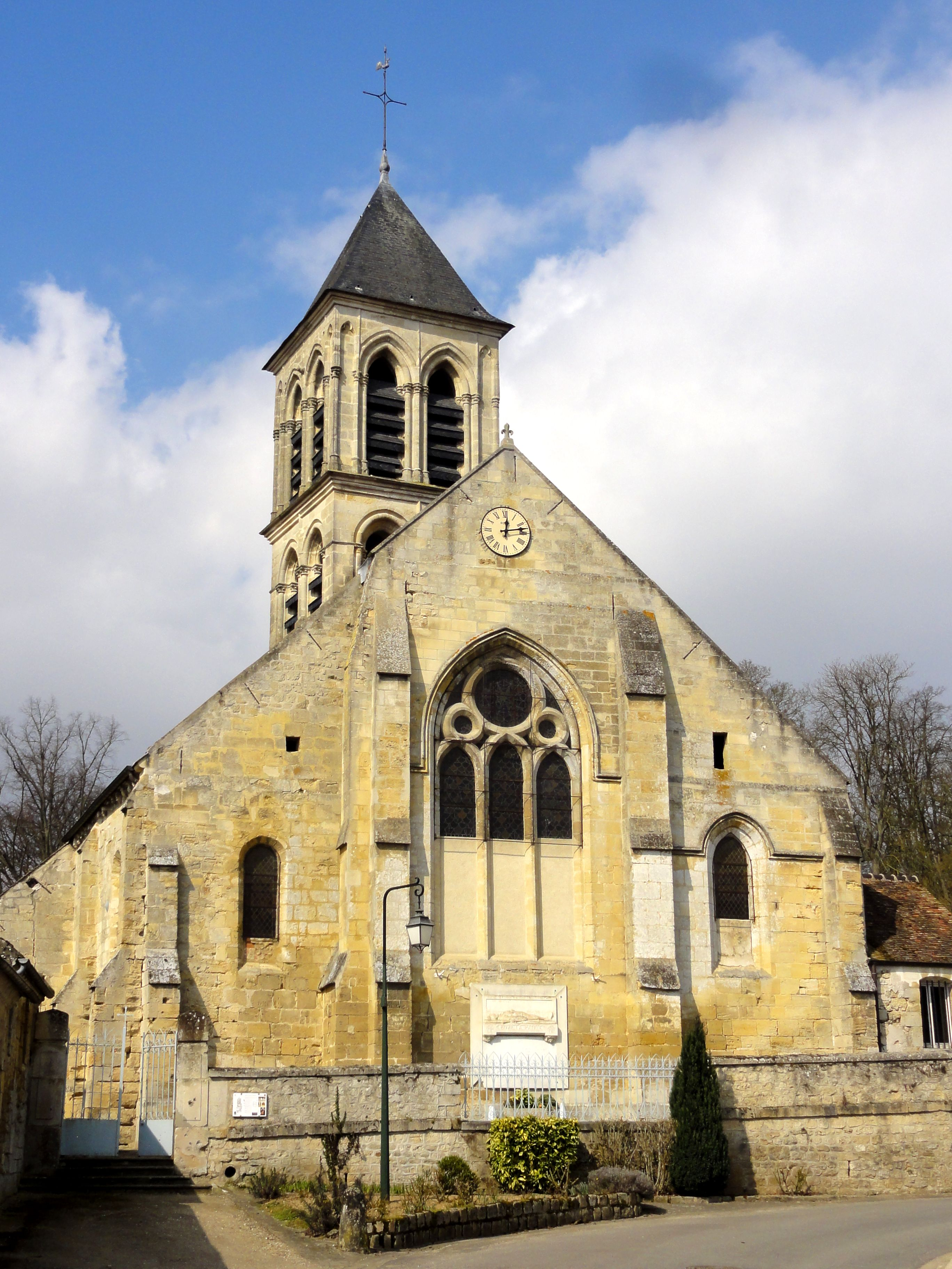 Façade du chevet.